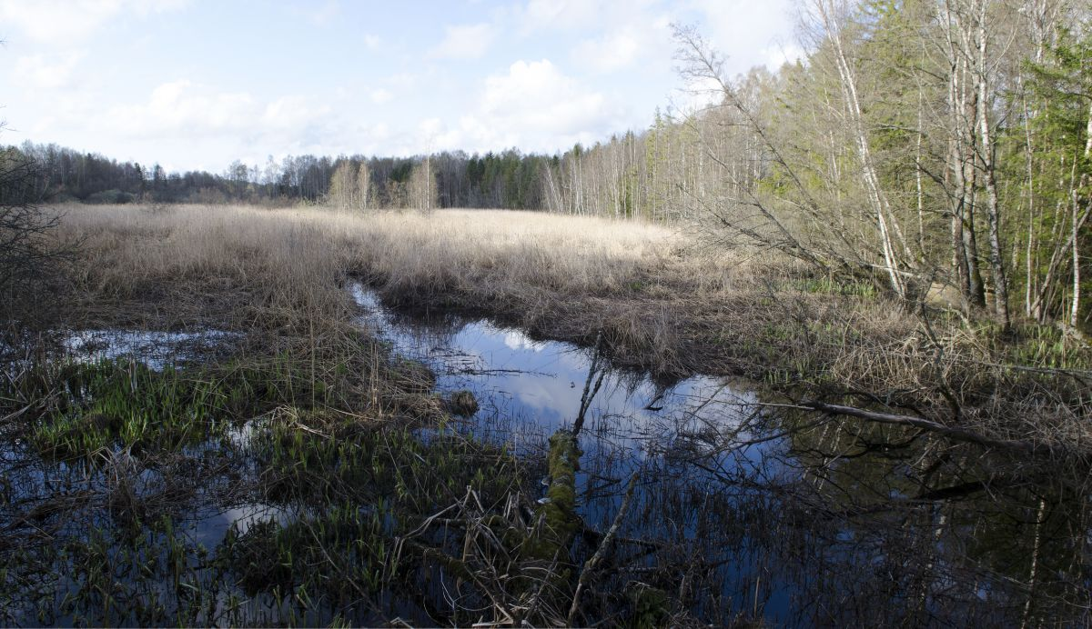 Robergvannet er i dag nesten gjengrodd.